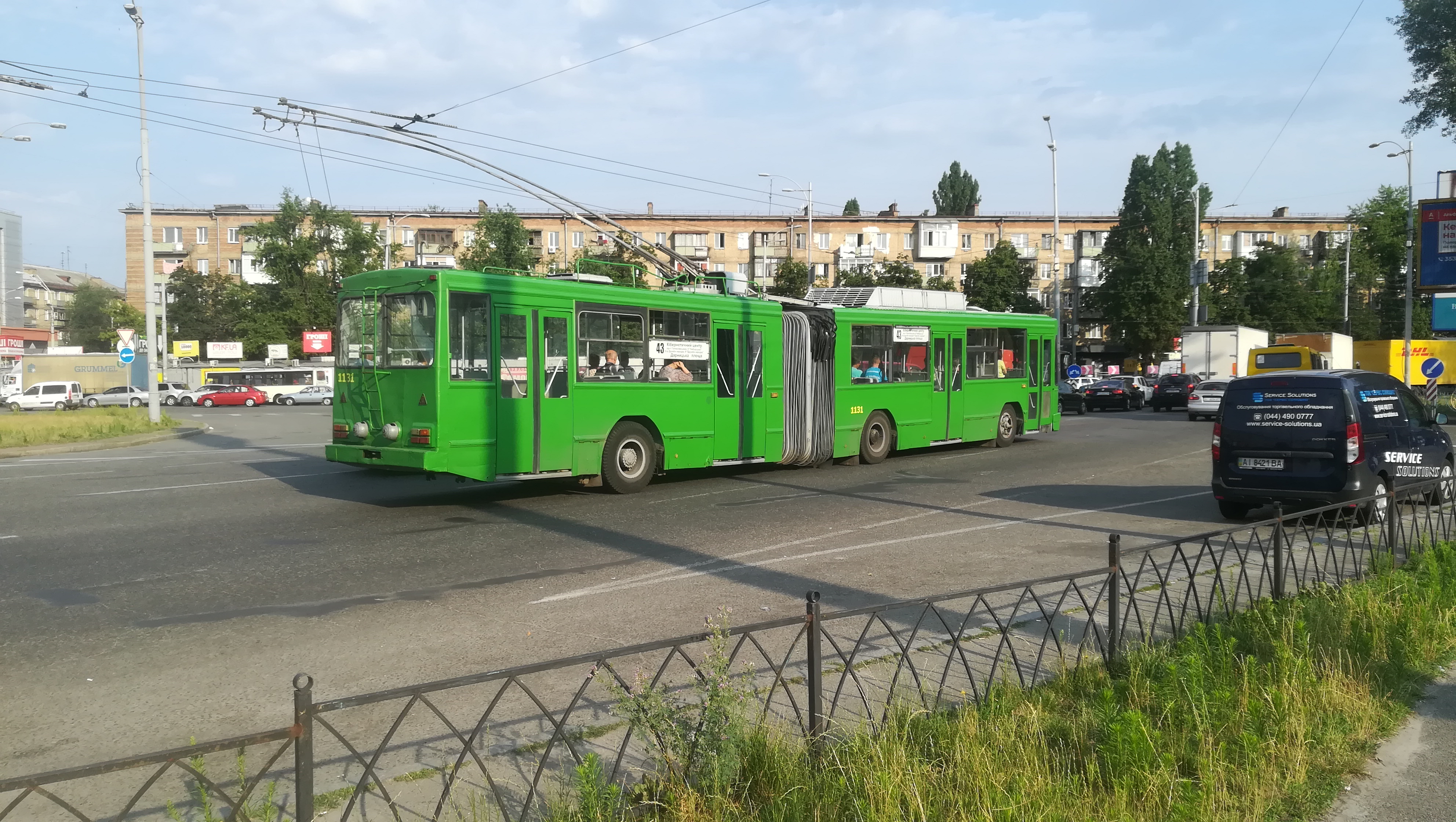 Тролейбус Київ-12.03 №1131 на Дарницькій площі у Києві (маршрут 43)